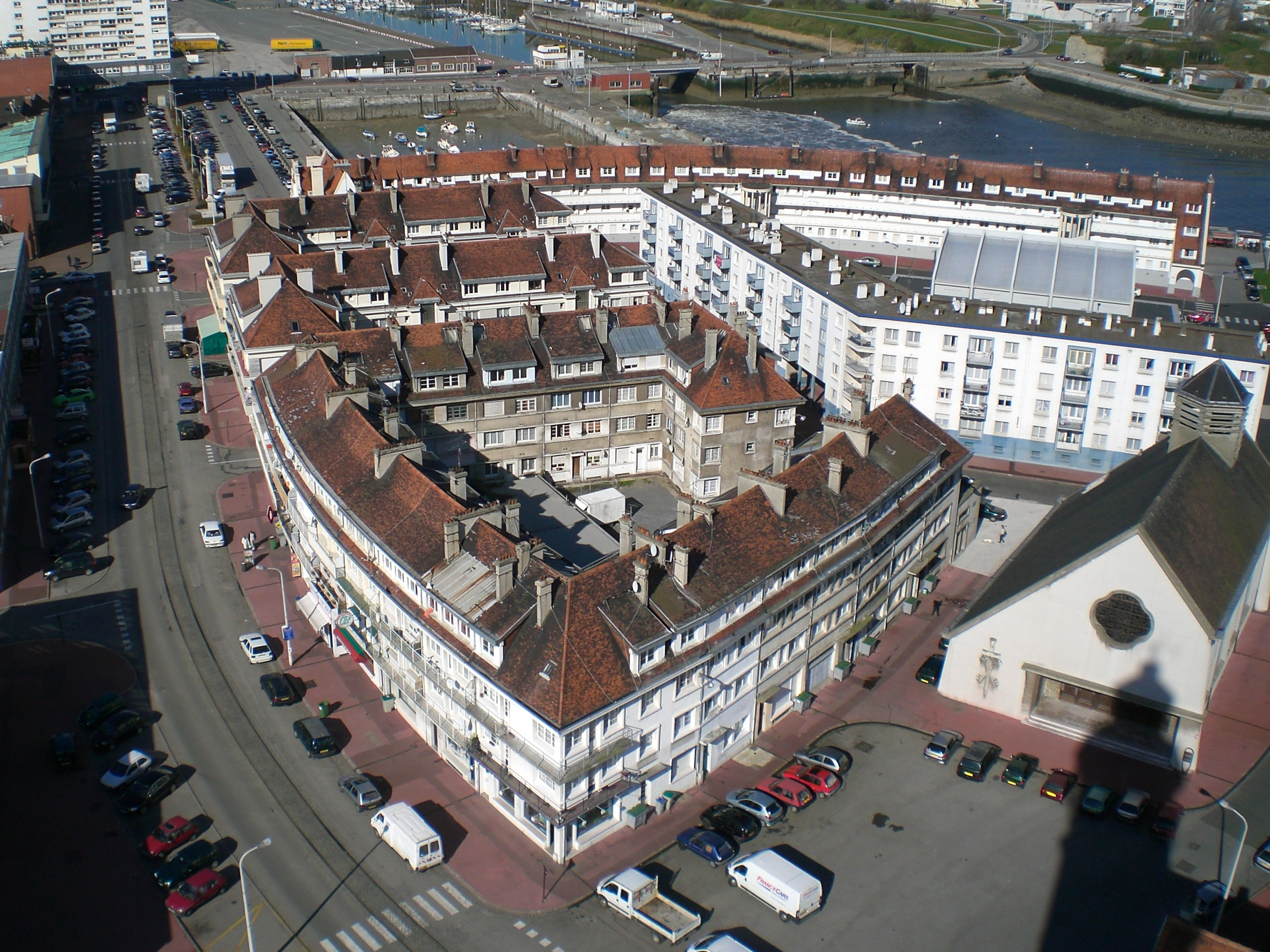 Le quartier des pêcheurs de Calais vu du phare.